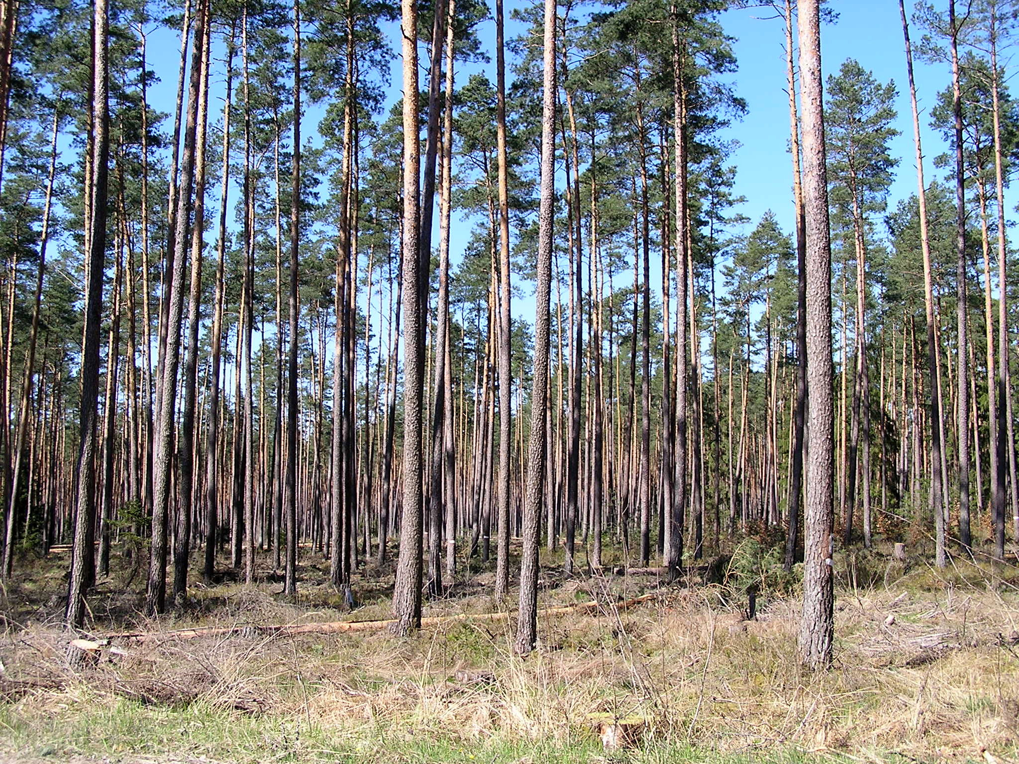 „Steckerlswald“ (auch Steckerlaswald oder Steggerlaswald) genannter Kiefernforst im Sebalder Reichswald (Nürnberger Reichswald), Bayern